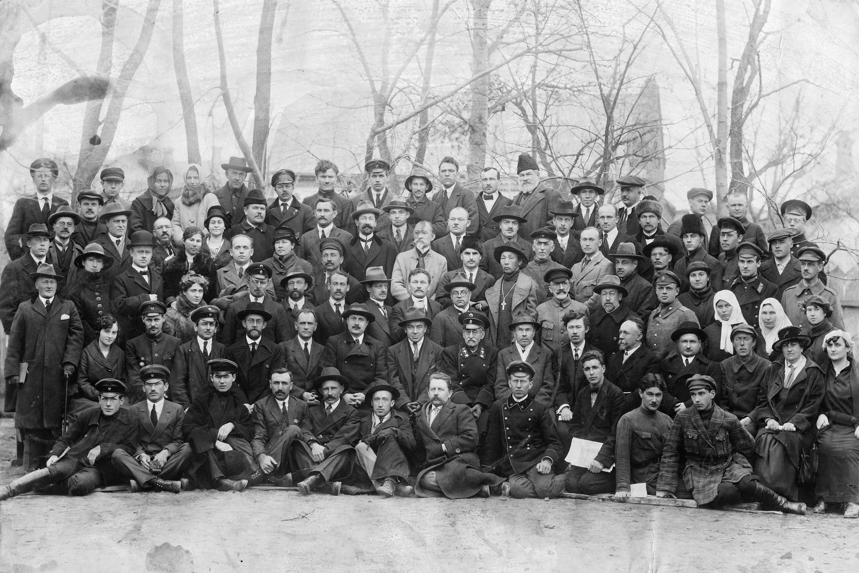 Участники Первого съезда по изучению Уссурийского края в естественно-историческом отношении